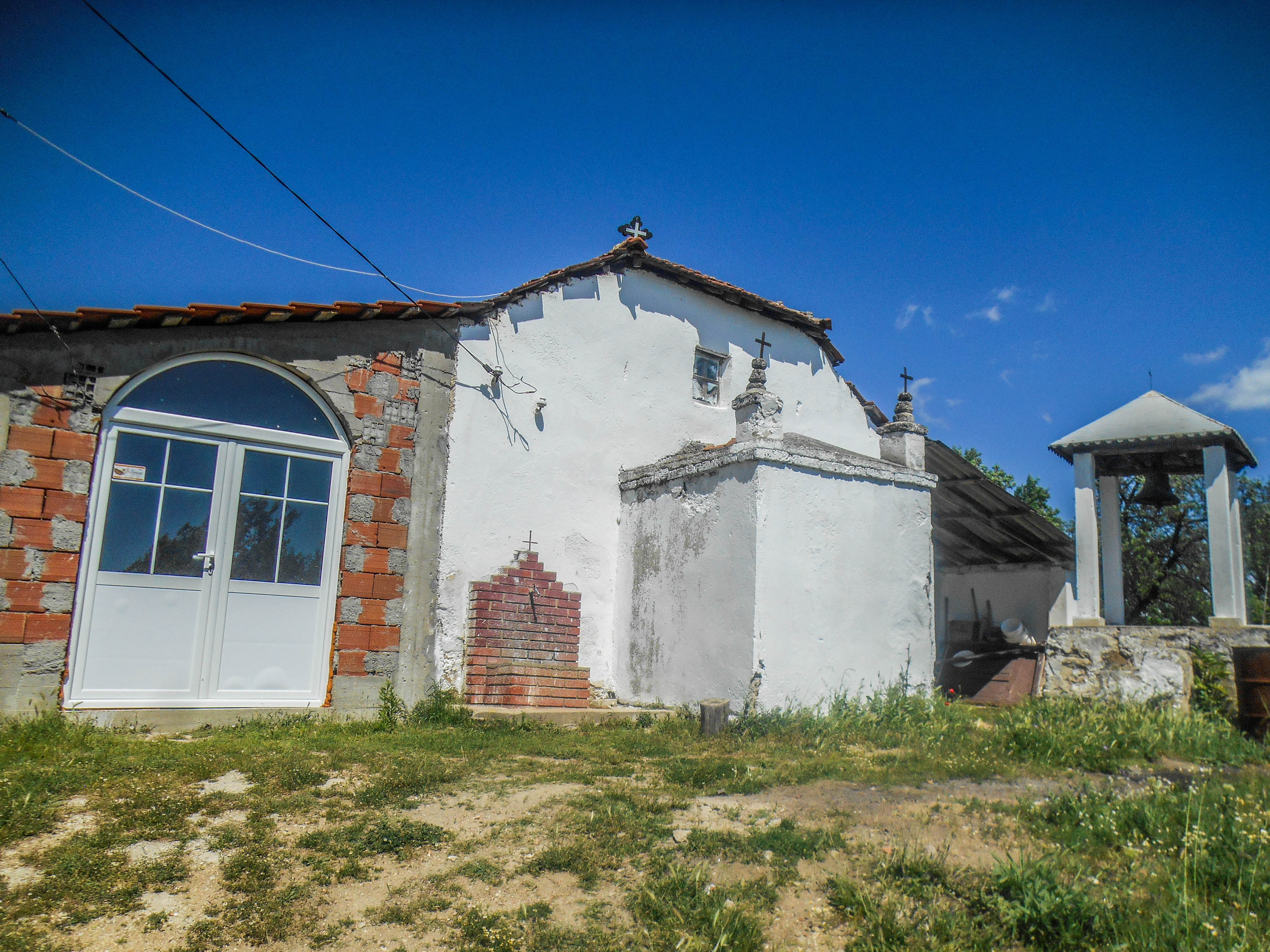 Црква „Св. Димитриј“ - Седларци